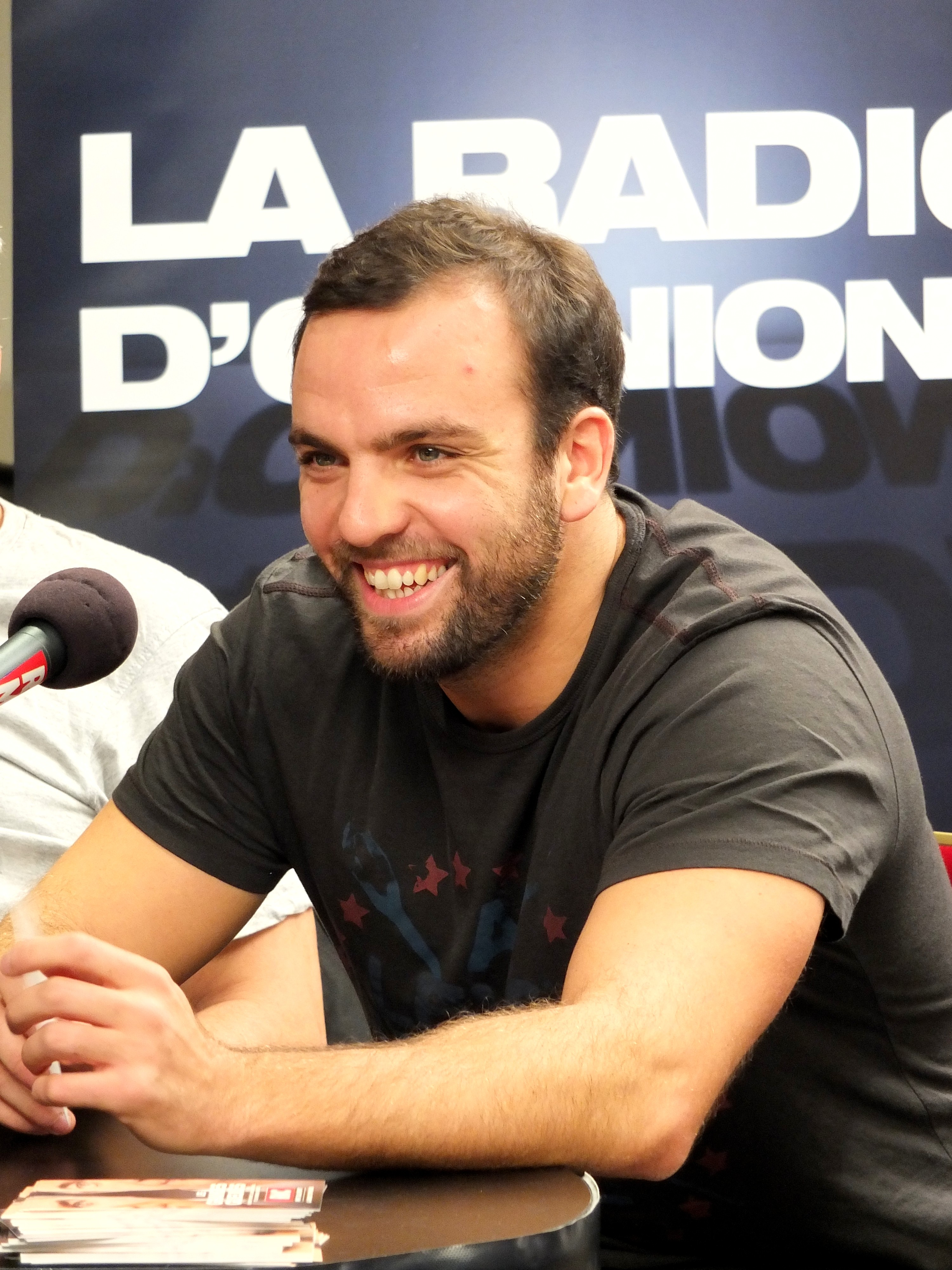 le Comte de Bouderbala (Sami Ameziane), humoriste français, lors d'une prestation dans l'émission de RMC Les Grandes Gueules, diffusée en direct le 19 octobre 2012 depuis la FNAC des Ternes, Paris (17e arrond).